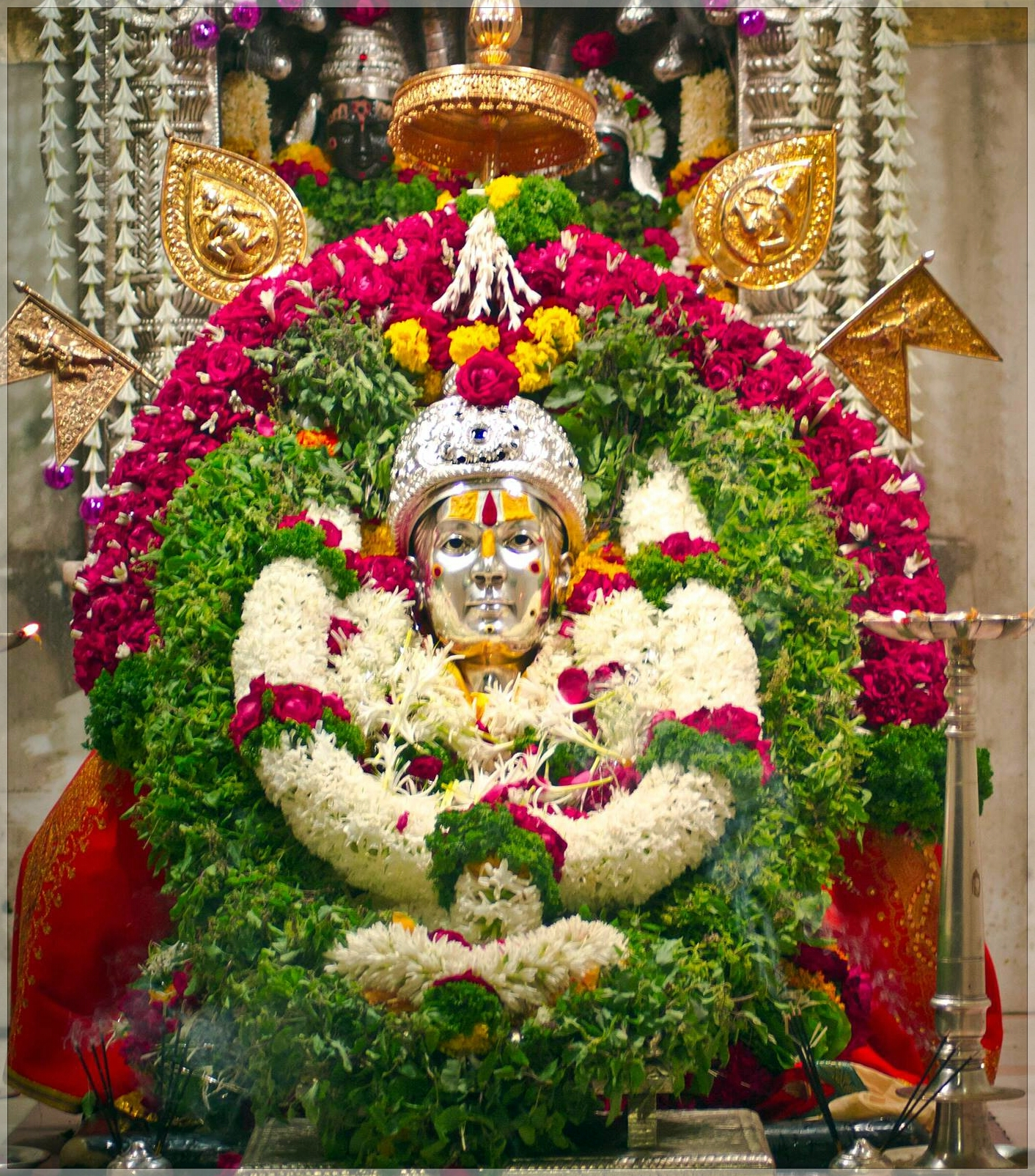 Saint Dnyaneshwar(Jnyandev) shrine in Alandi, Pune, India